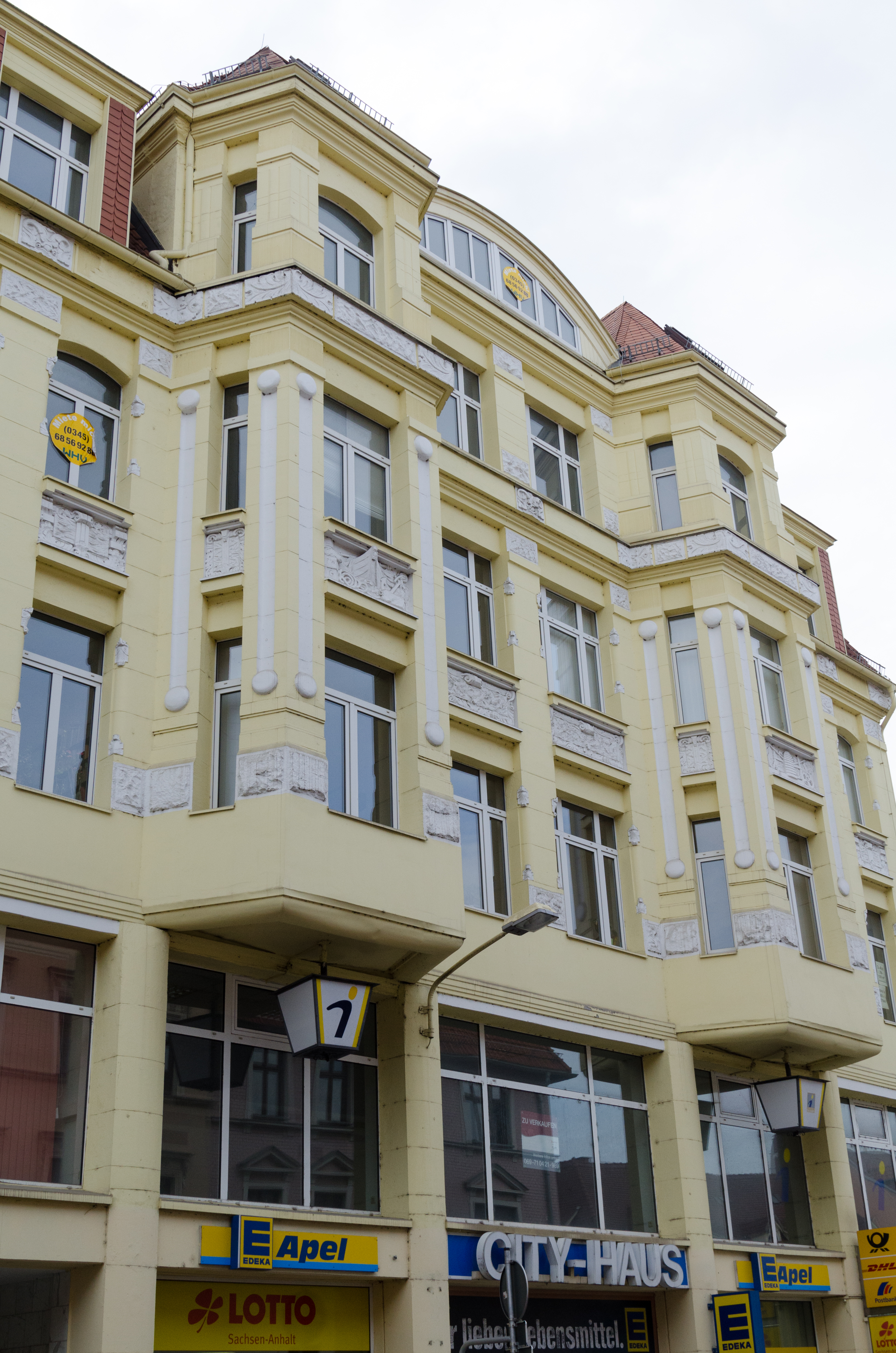 Zeitz, Fischstraße 6